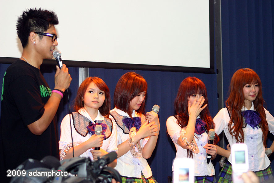 我愛黑澀會第6套制服